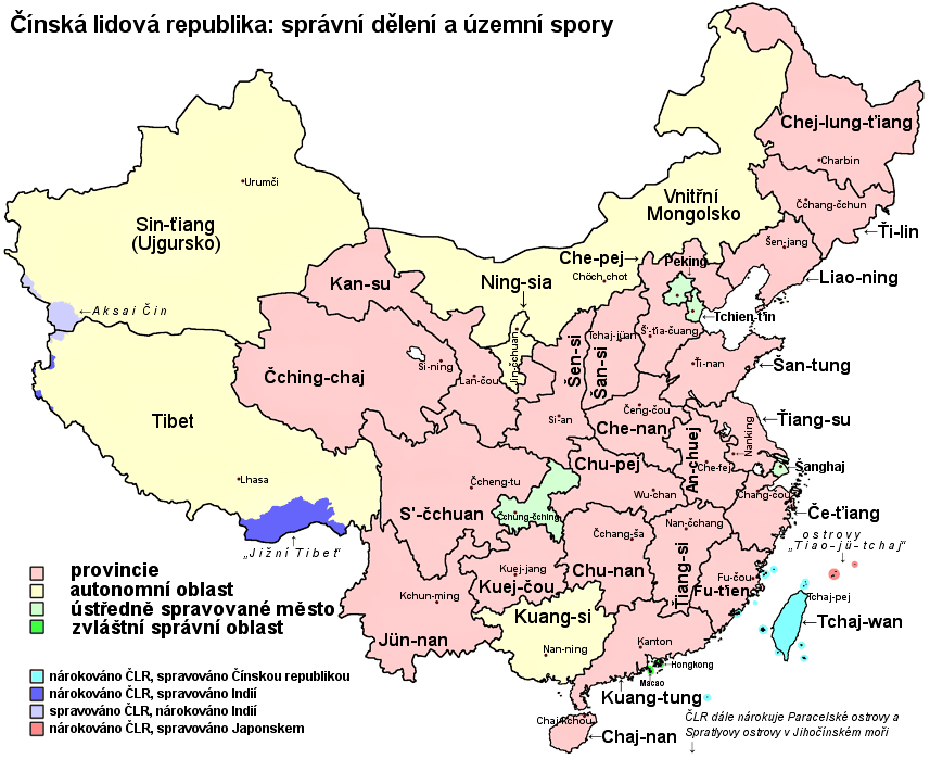 Mapa správního dělení Čínské lidové republiky a jejích územních sporů.